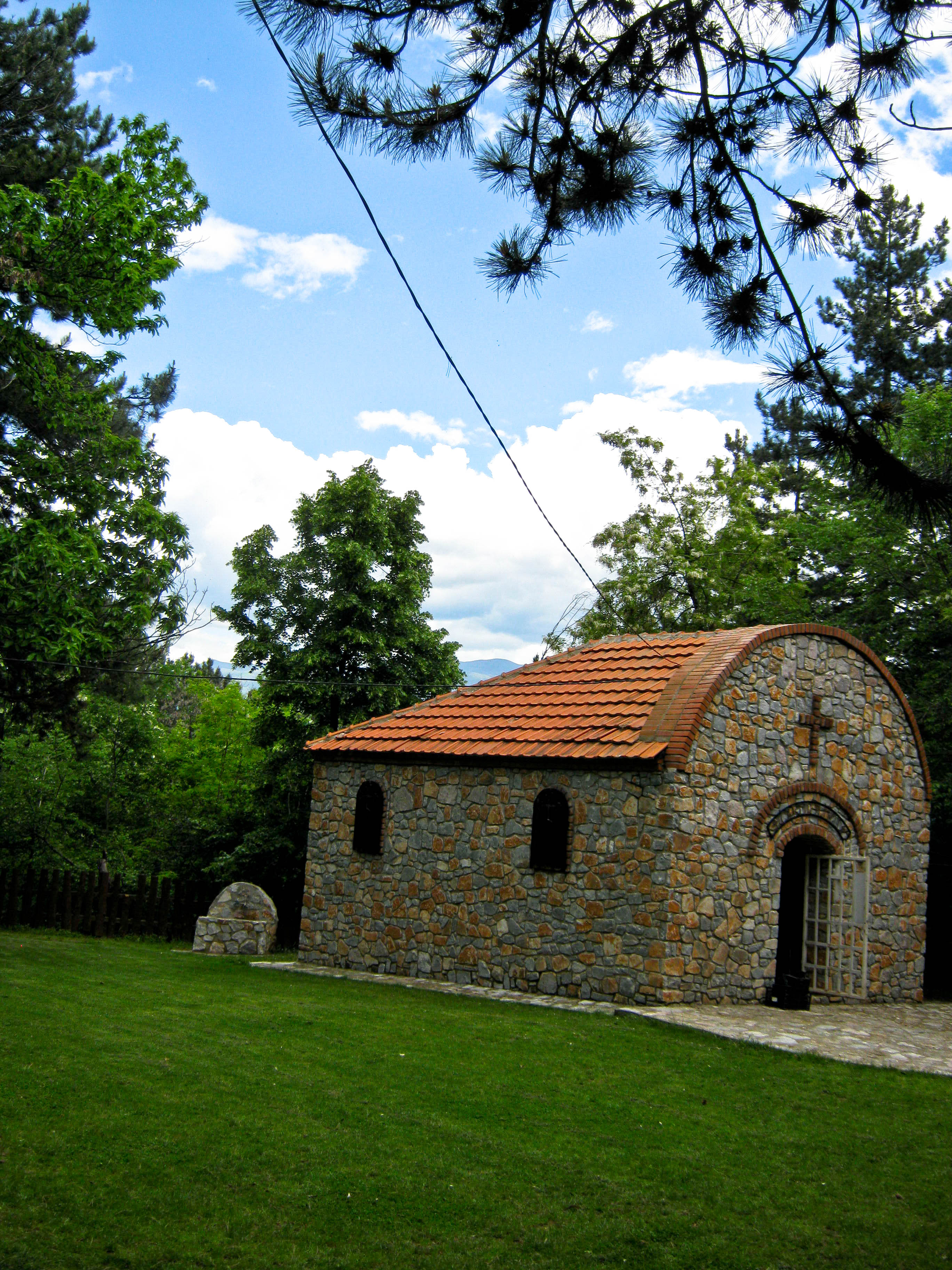 Св Илија Врапчиште